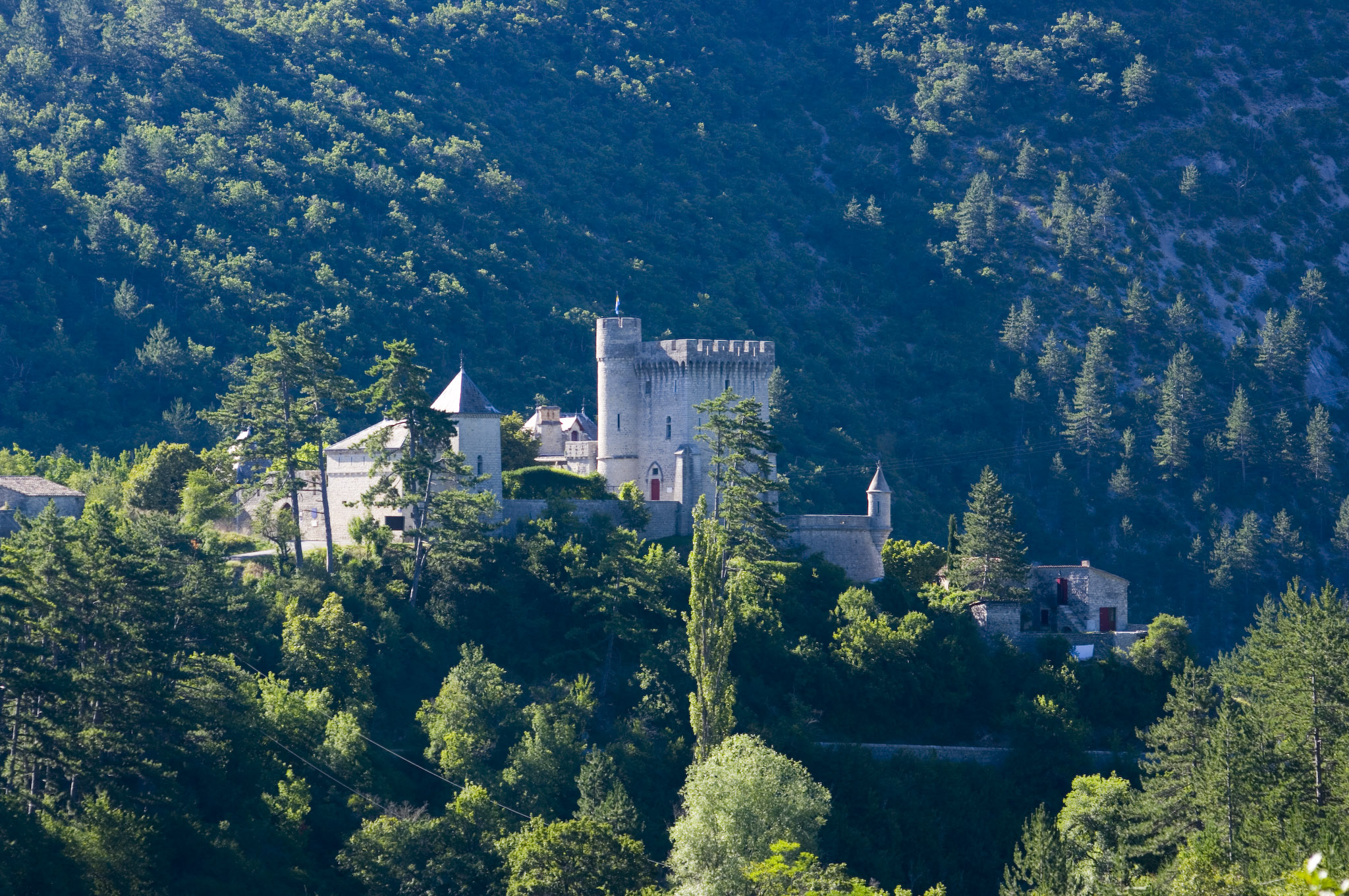 Vue ouest Château d'Aulan (26-drôme)